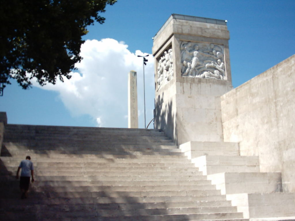 Foto di Wolfbark concessa sotto